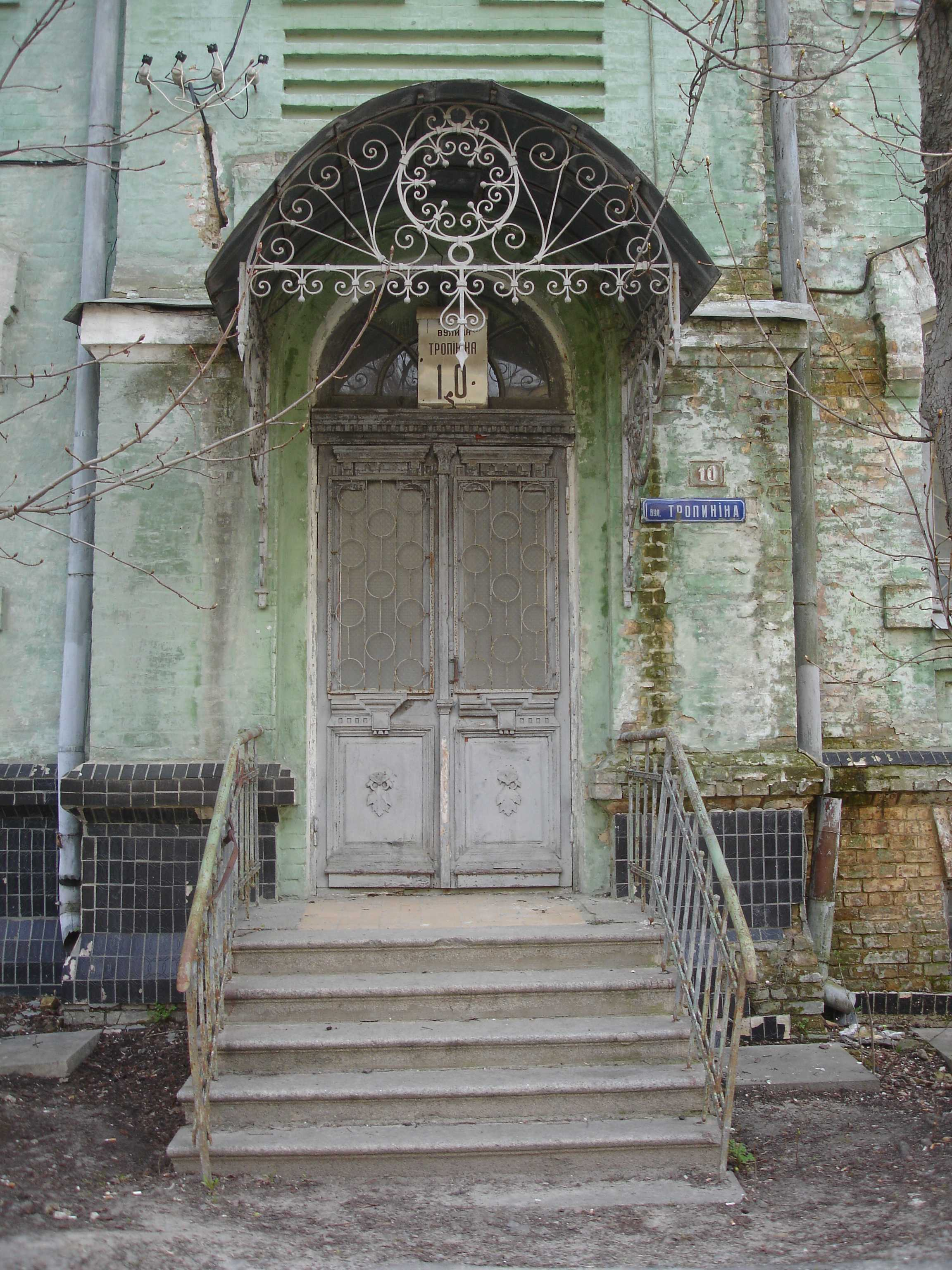 Будинок по вул.Тропініна, 10 у Києві. Головний вхід. 2012 р.